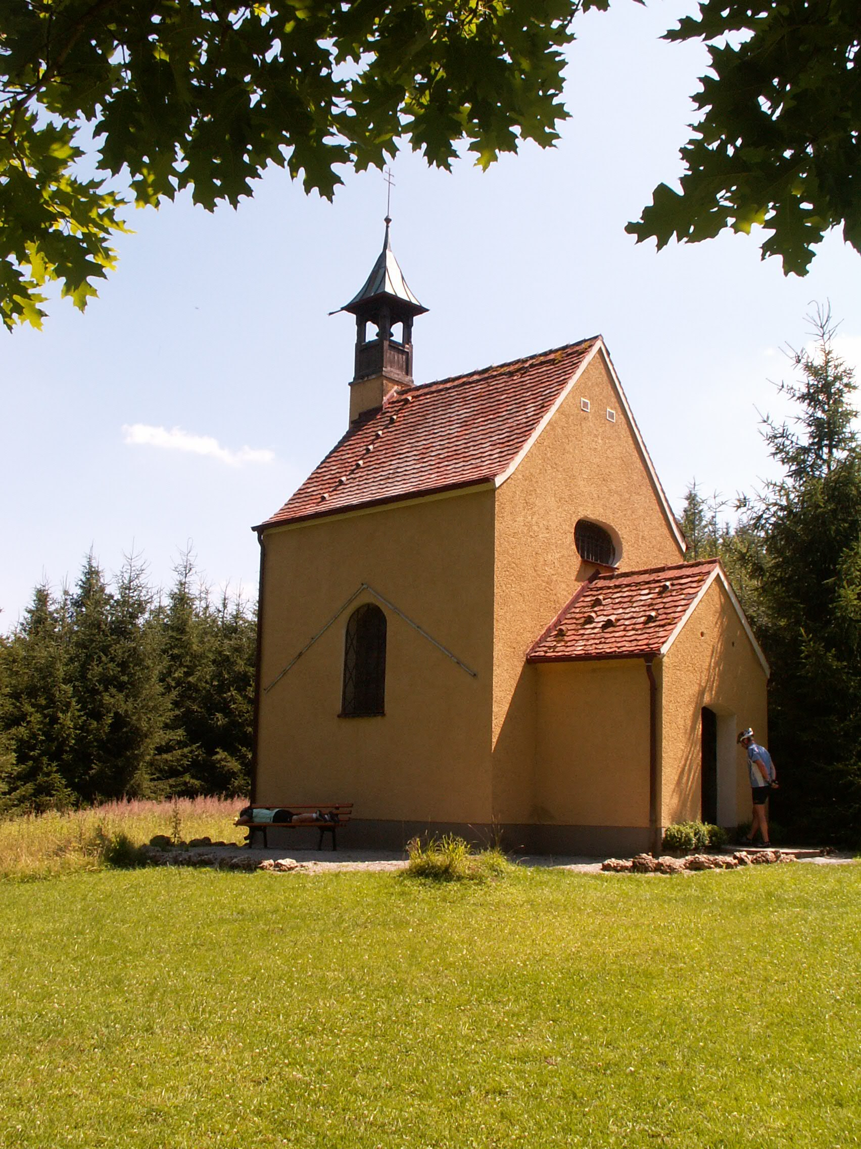 Scheppachkapelle bei Döpshofen